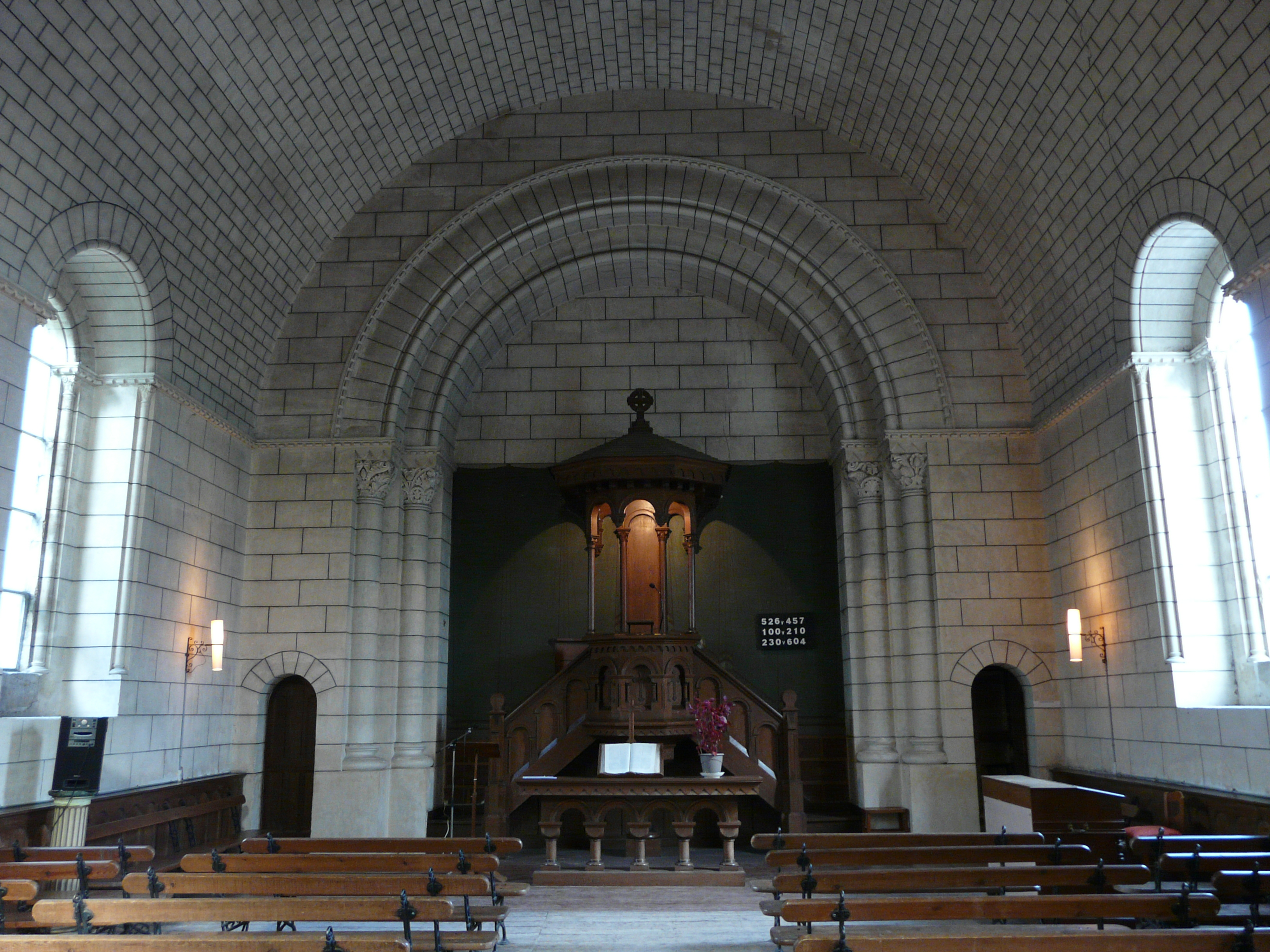 L'intérieur du temple du Fleix, Dordogne, France.